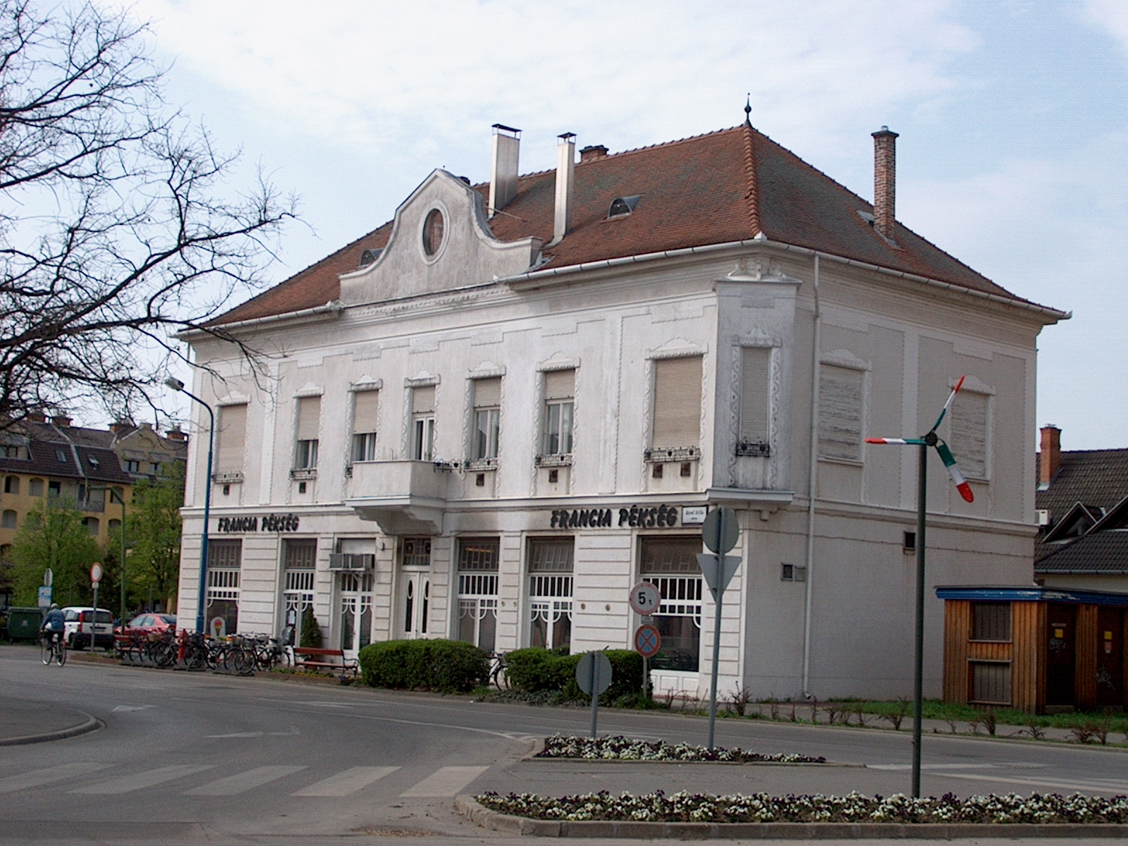 Simkó Ignác bérháza Szentesen. A körzeti- és a városi fiókkönyvtár 1952-ben átköltözött a József Attila utca 1. szám alatti egykori Simkó Ignác-féle bérházba. Ez 1914-ben épült eklektikus stílusban Bene Árpád tervei alapján (wikipédia) 'Evangélikus Elemi Népiskola (Gyermekkönyvtár)' néven védett, azonosító: -10820. - ma Francia pékség (Szentes). ÉS nemzetiszín propeller, repülős emlék? This is a photo of a monument in Hungary. Identifier: -10820